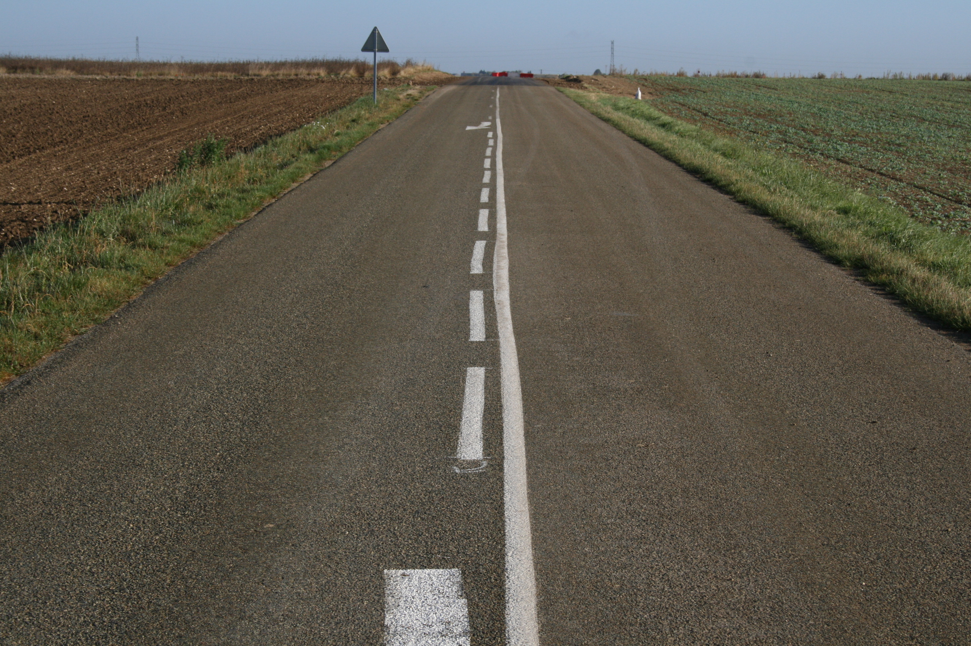 Ligne d'annonce de ligne continue non rectiligne en France